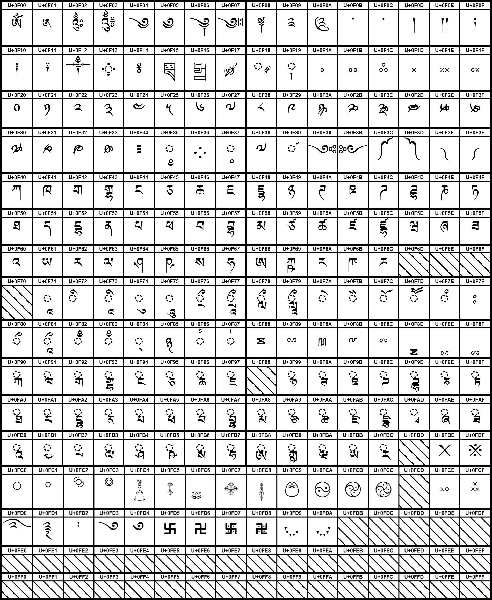 Grafiktafel für den Unicodeblock Tibetisch. Schraffierte Felder sind unbesetzte Codepoints.